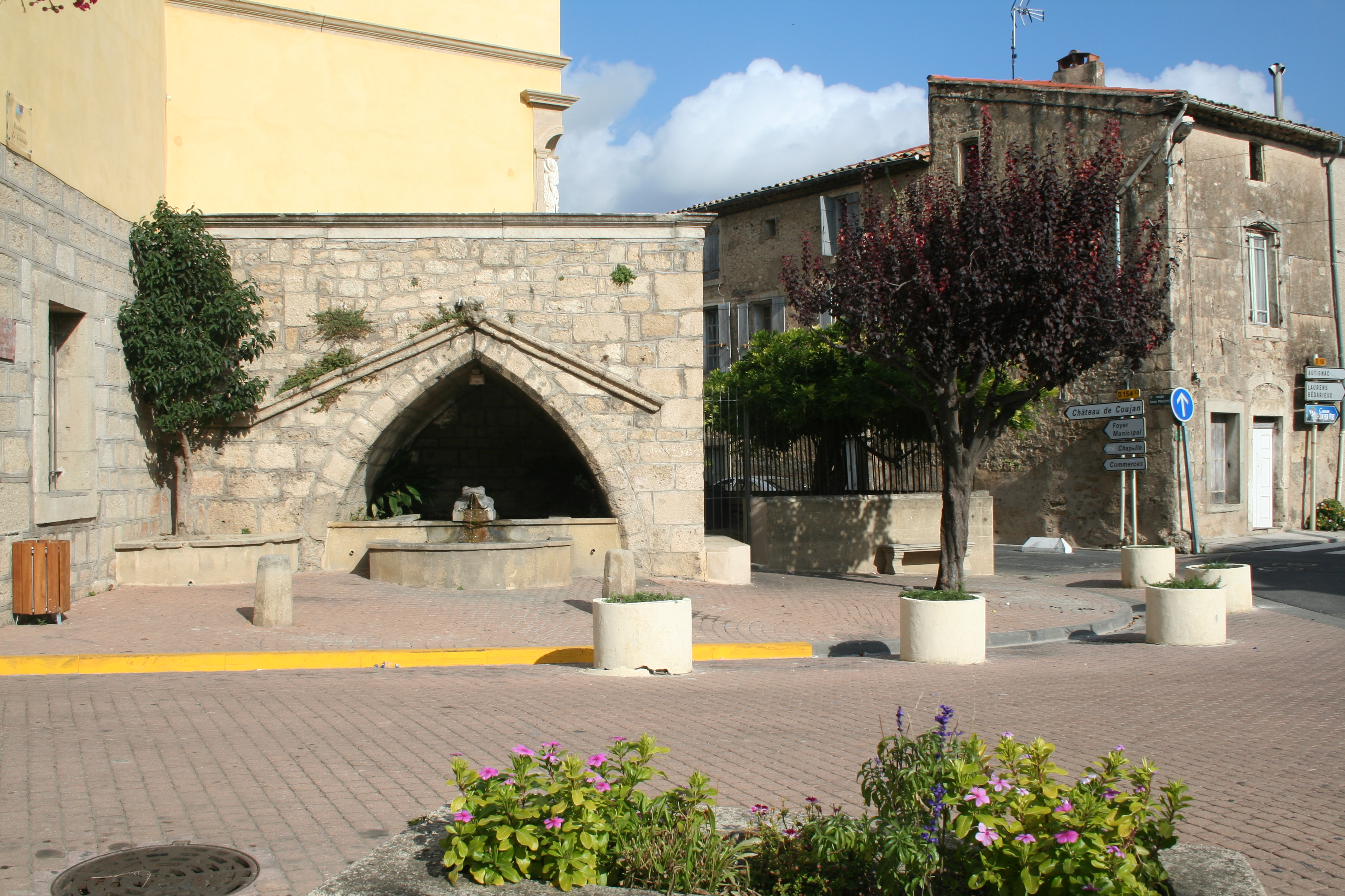 Saint-Geniès-de-Fontedit (Hérault) - fontaine.